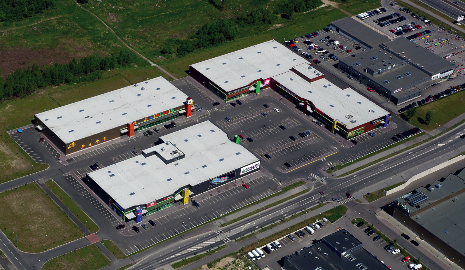 Õhuvaade Tondiraba asumile